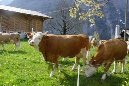 Simmentaler Kühe (Fleckvieh) auf Bergbauernbetrieb im Berner Oberland